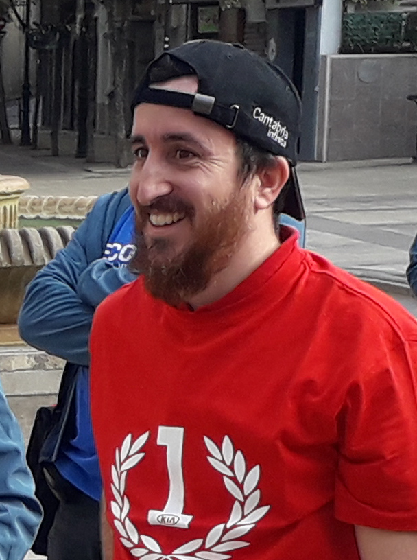 Il copilota di rally spagnolo Loren Serrano dopo l'Eco Rallye de la Comunitat Valenciana 2019 a Castellón de la Plana